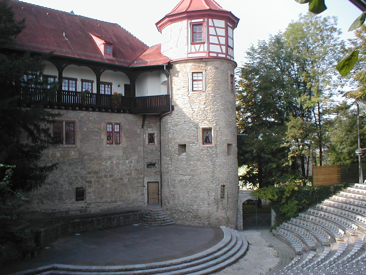 Freilichtbühne im Burggraben vom Schloss in Neuenstadt am Kocher